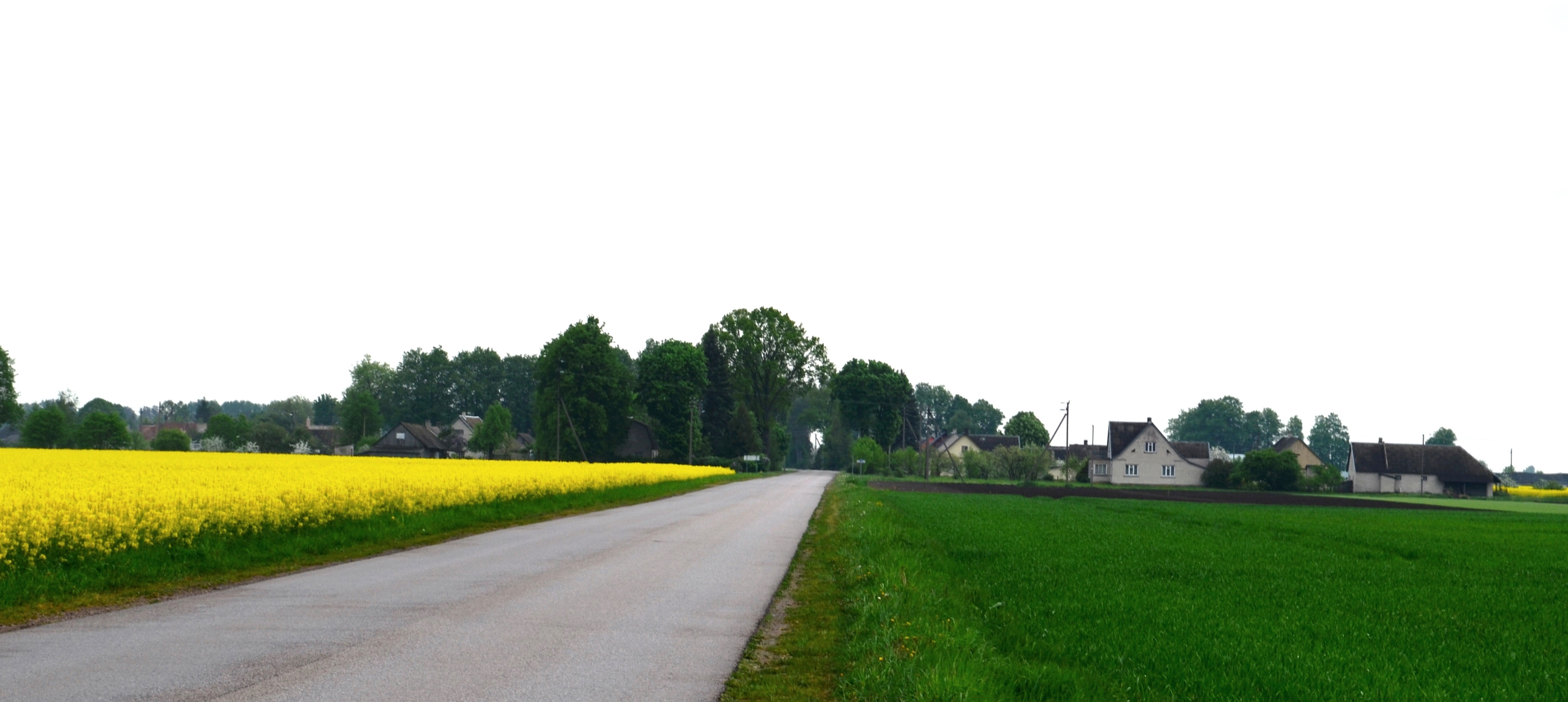 Sviliai, Kėdainių raj.